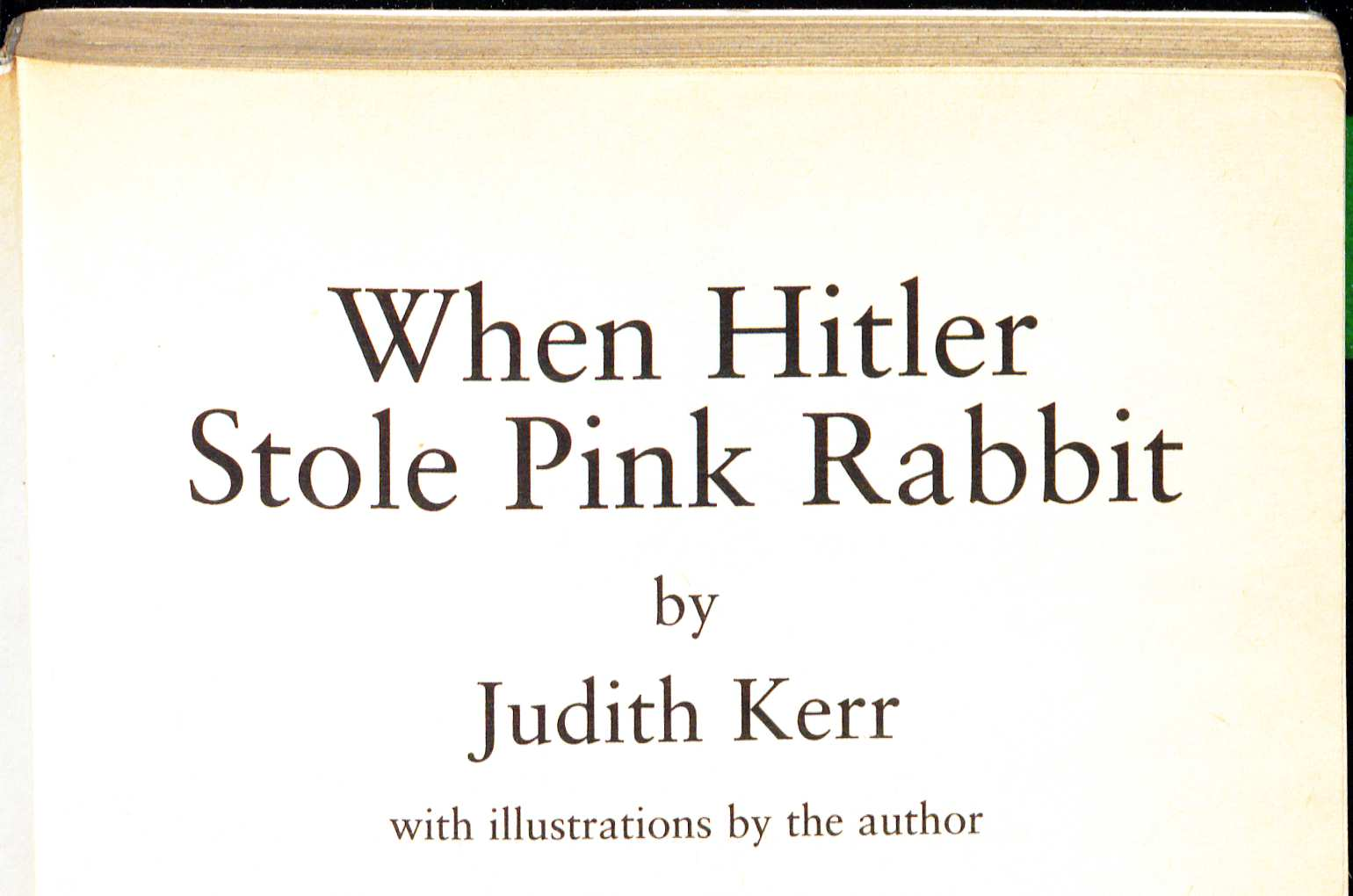 Judith Kerr When Hitler Stole Pink Rabbit Harper Collins paperback edition 2002 Title cropped without the illustration by Kerr